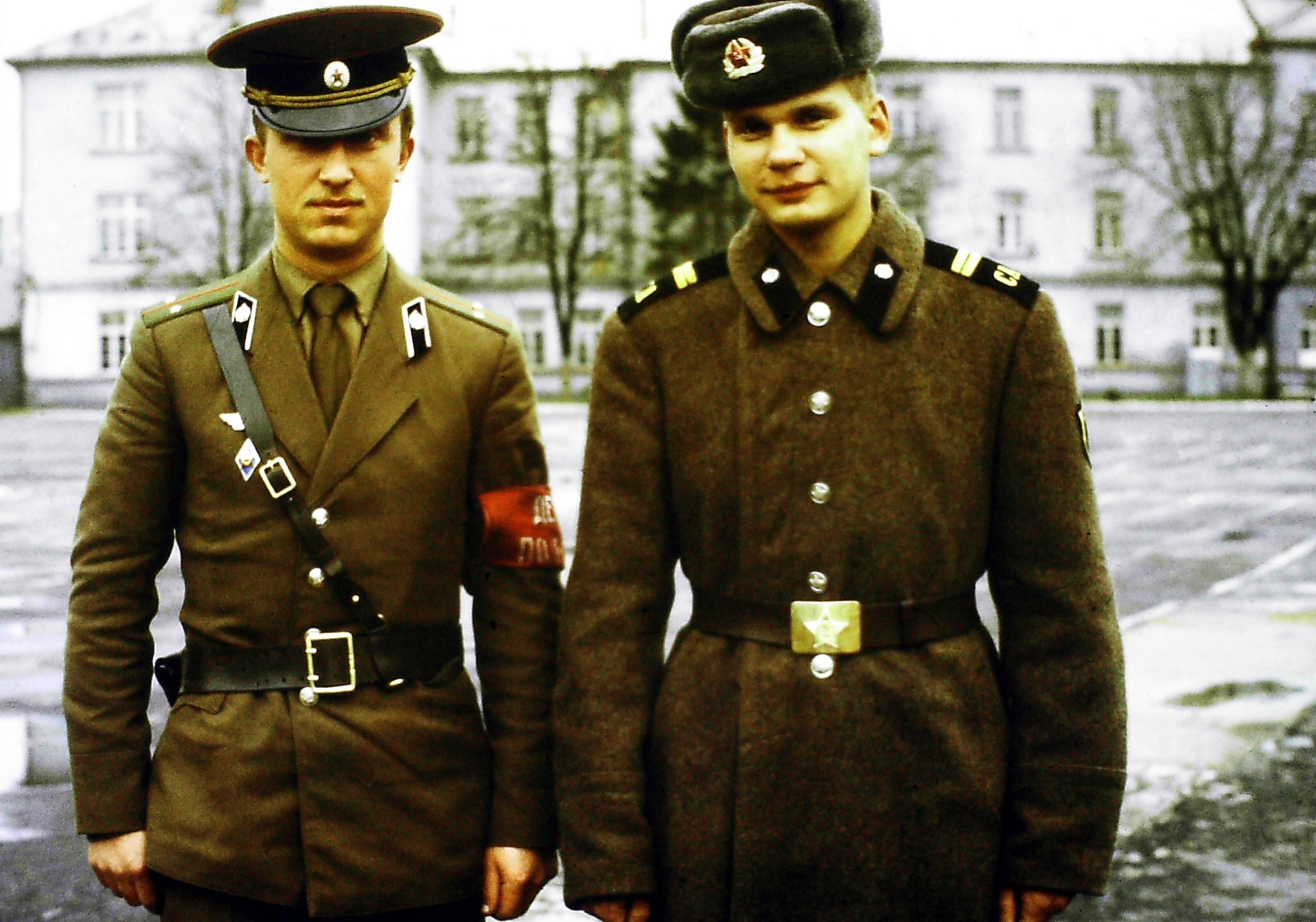 118-й отдельный инженерно-сапёрный батальон в городе Высоке-Мито, Чехословакия. Ценральная группа войск (ЦГВ)